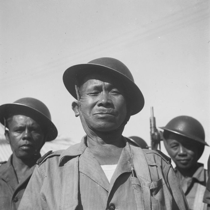 negatief. Portret van "Oom Kappa", militair in het reservekorps te Tondano